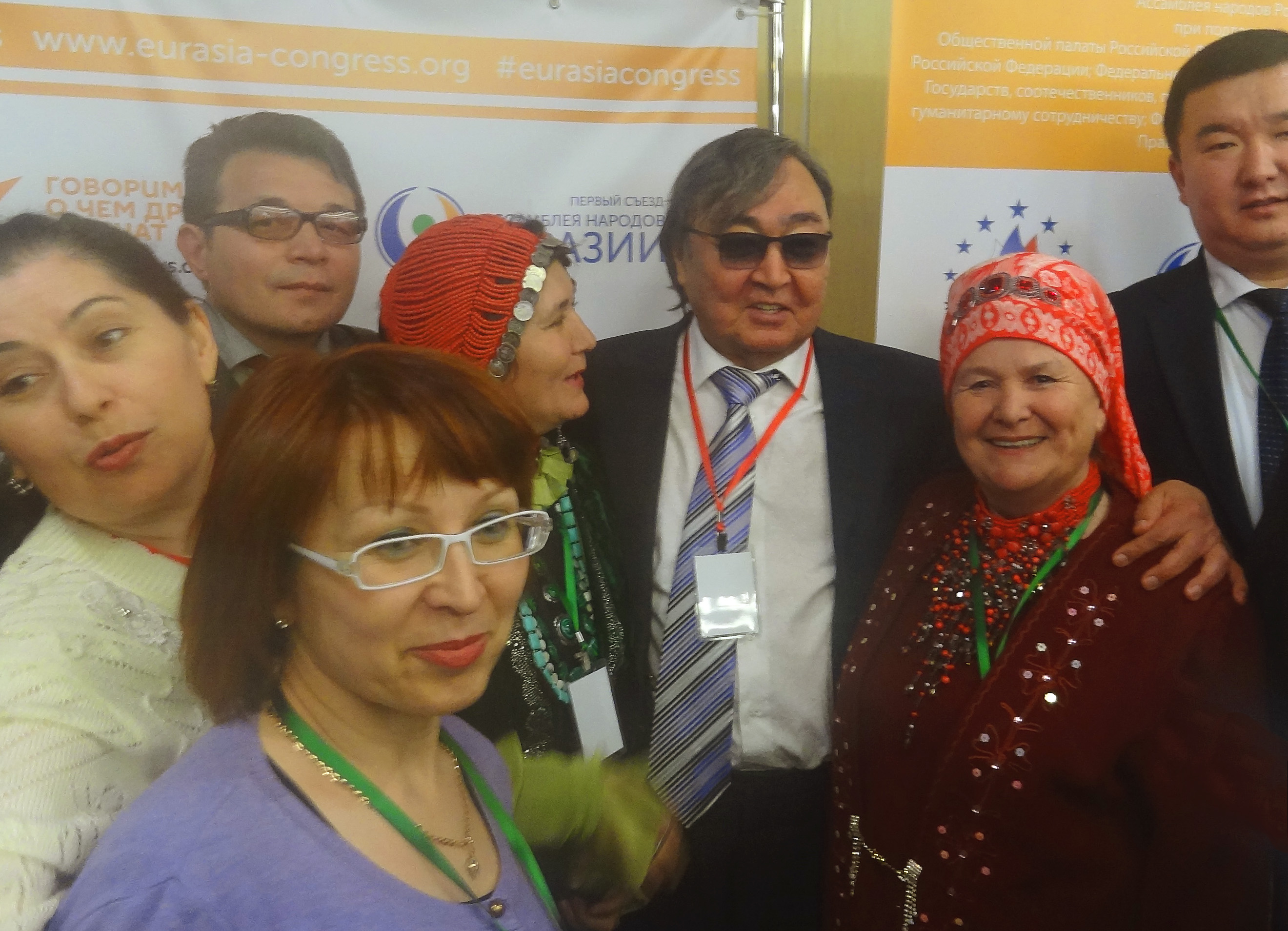 Олжас Сулейменов с участниками литературного фестиваля ЛиФФт на 1-ом Съезде Ассамблеи Народов Евразии в Москве.